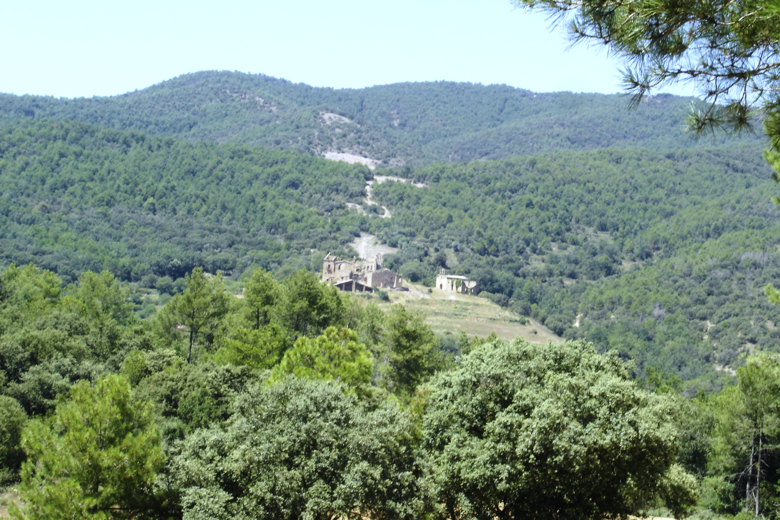 El poblament de Pampe, al municipi de Castellar de la Ribera (Solsonès)